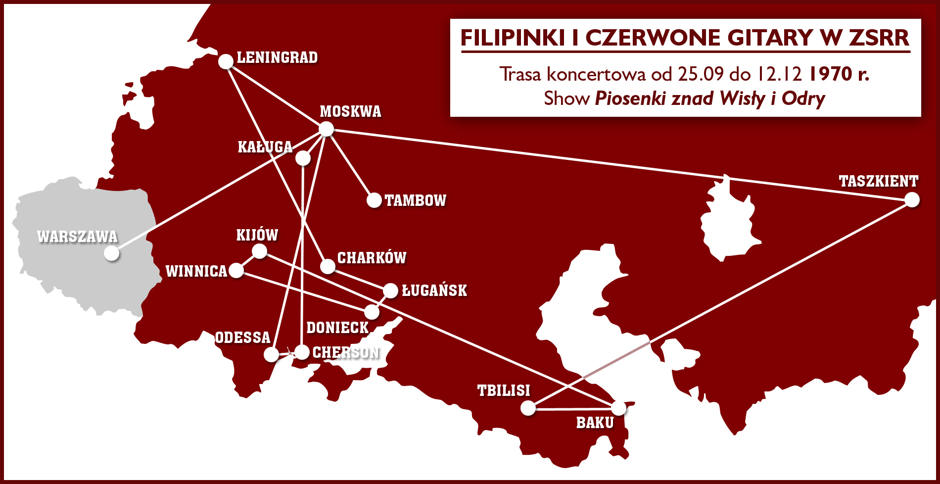 Trasa koncertowa „Piosenki znad Wisły i Odry” zespołów Filipinki i Czerwone Gitary oraz towarzyszących im artystów w ZSRR jesienią 1970 r.